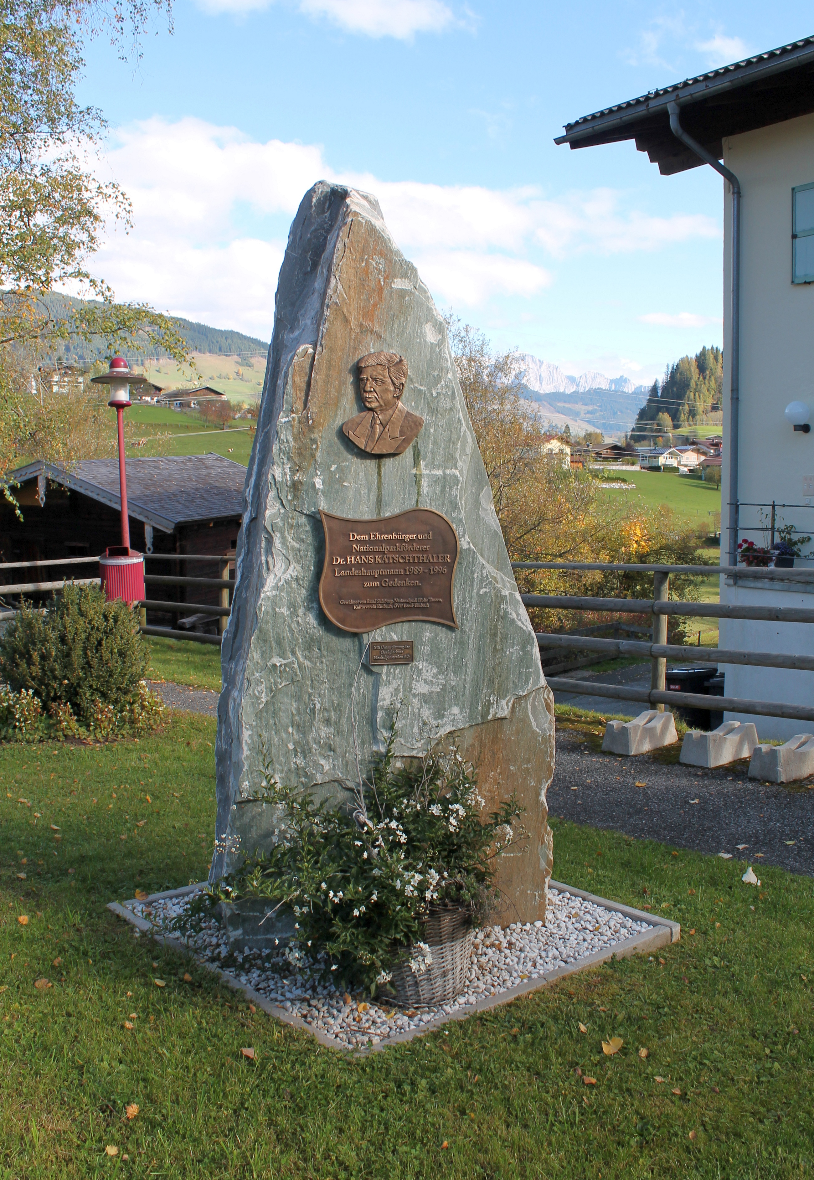 Denkmal für Hans Katschthaler in Embach, Gemeinde Lend, Land Salzburg, Österreich